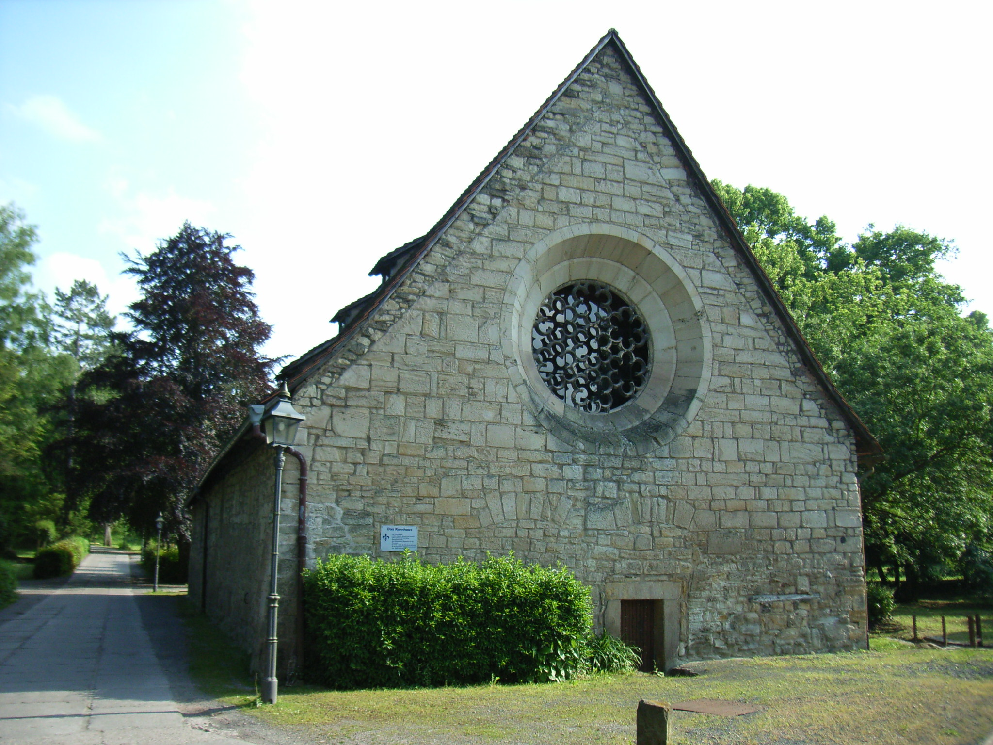 Georgenthal/Thüringen, Kornhaus